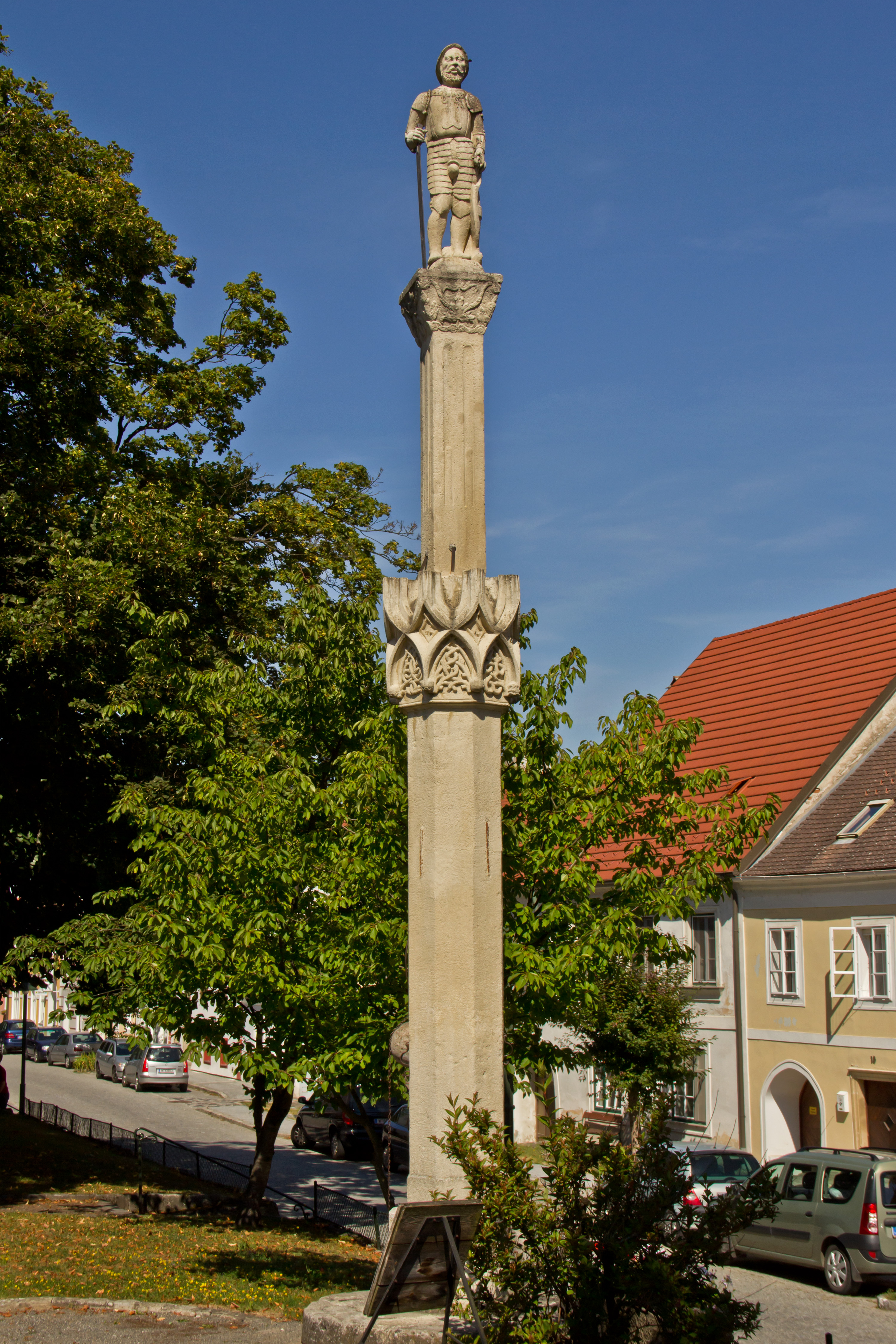 Der Pranger in Drosendorf ist einer der höchsten erhaltenen im deutschsprachigen Raum. Der Unterteil stammt aus der Zeit um 1500 und hat einen gotischen Kielbogen. Der Steinerne Mann wurde 1616 angefertigt.